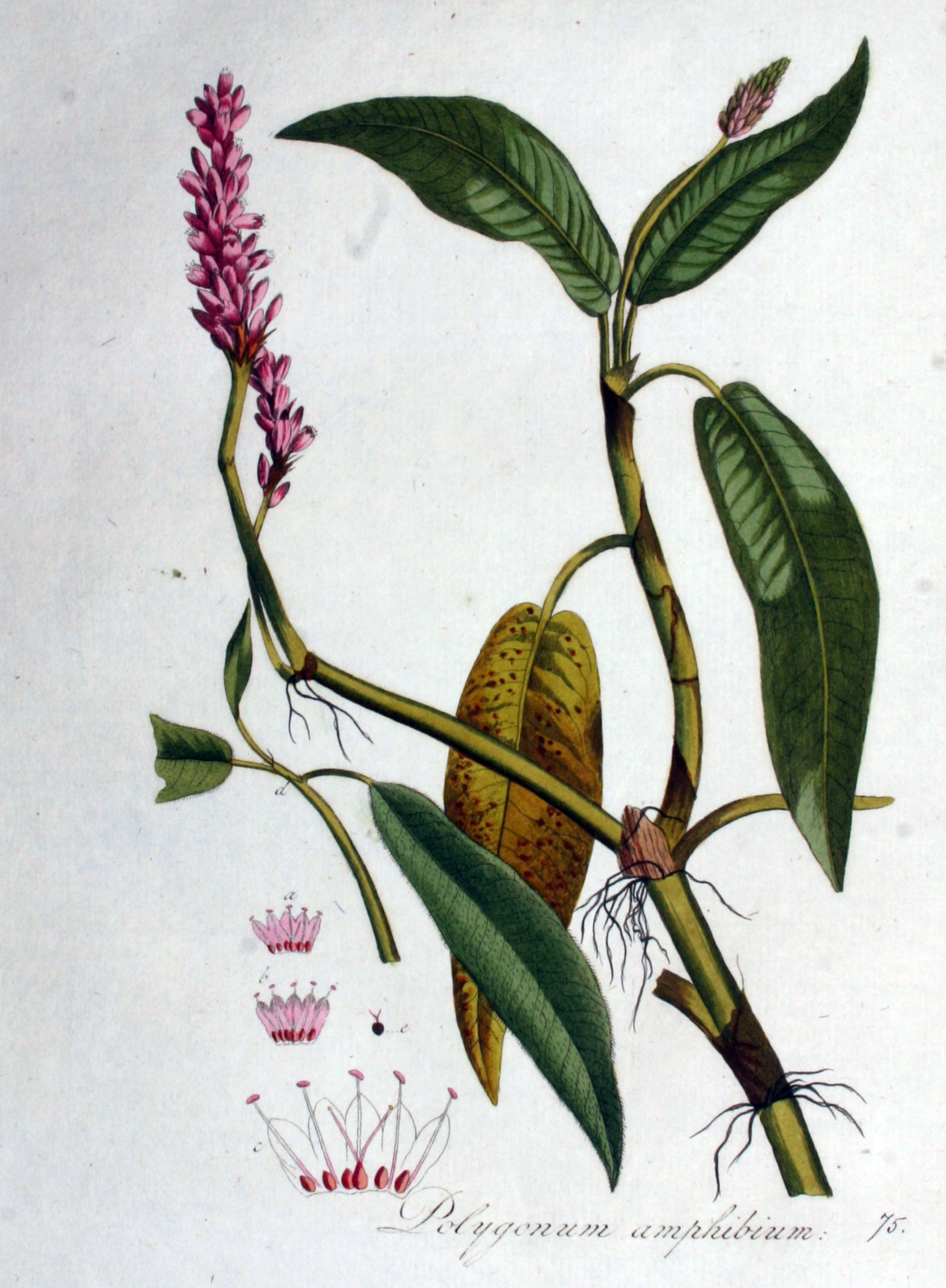 Persicaria amphibia (L.) S.F. Gray (Syn. Polygonum amphibium L.)